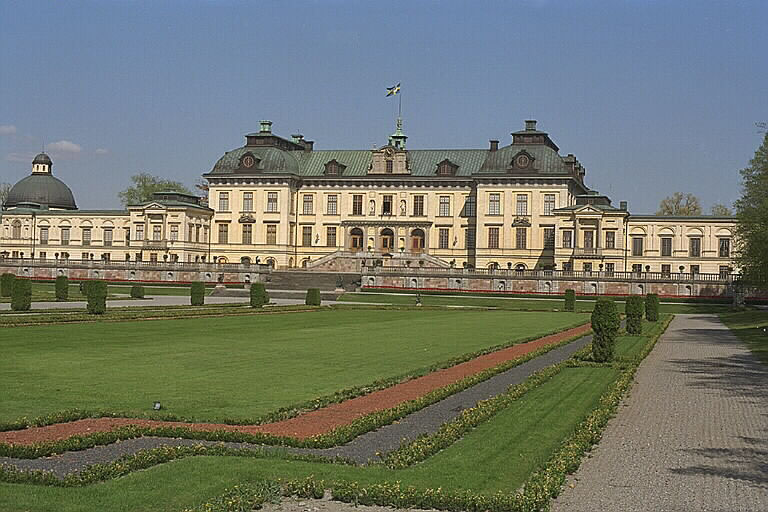 Slottet med barockträdgården i förgrunden. Motiv: Drottningholm Nyckelord: Byggnadsminnen:Statl, Världsarv Kategori: SlottSlottet med barockträdgården i förgrunden.